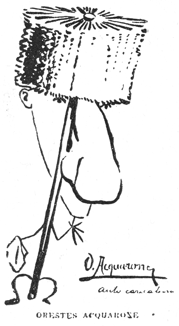 Autocaricatura de Orestes Acquerone publicada en la revista "Rojo y Blanco" en 1900.